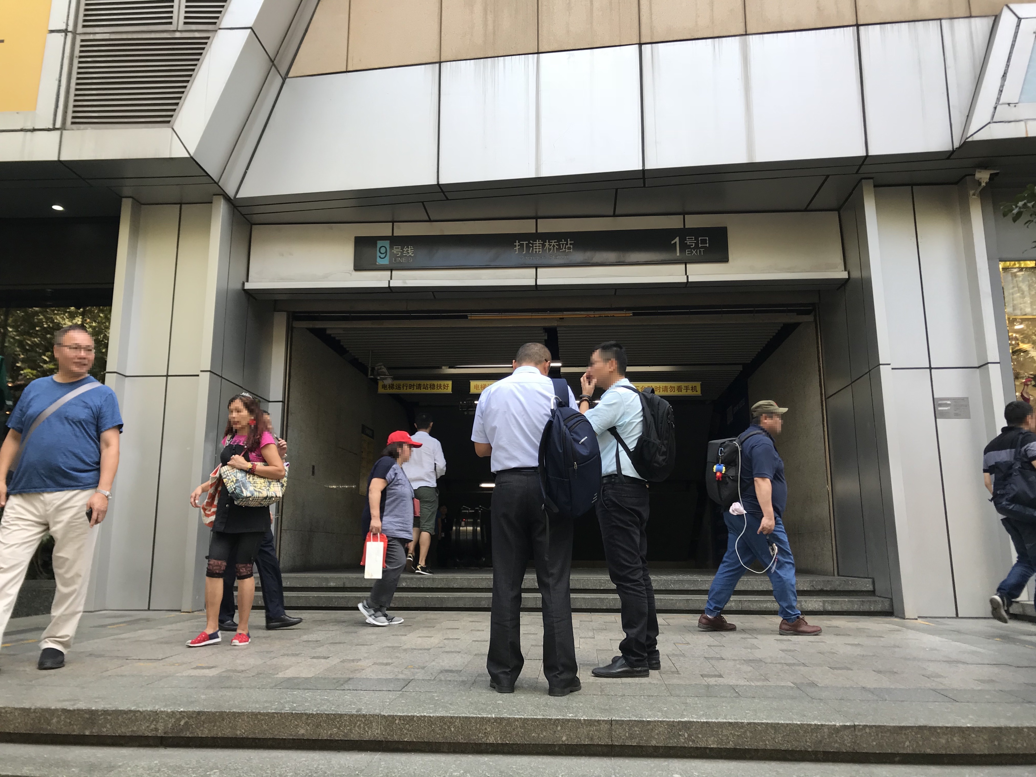 打浦橋駅の1番出入り口